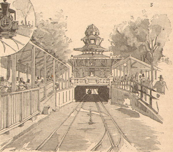 Chemin de Fer-Tramway Decauville de l'Exposition Universelle Paris 1889